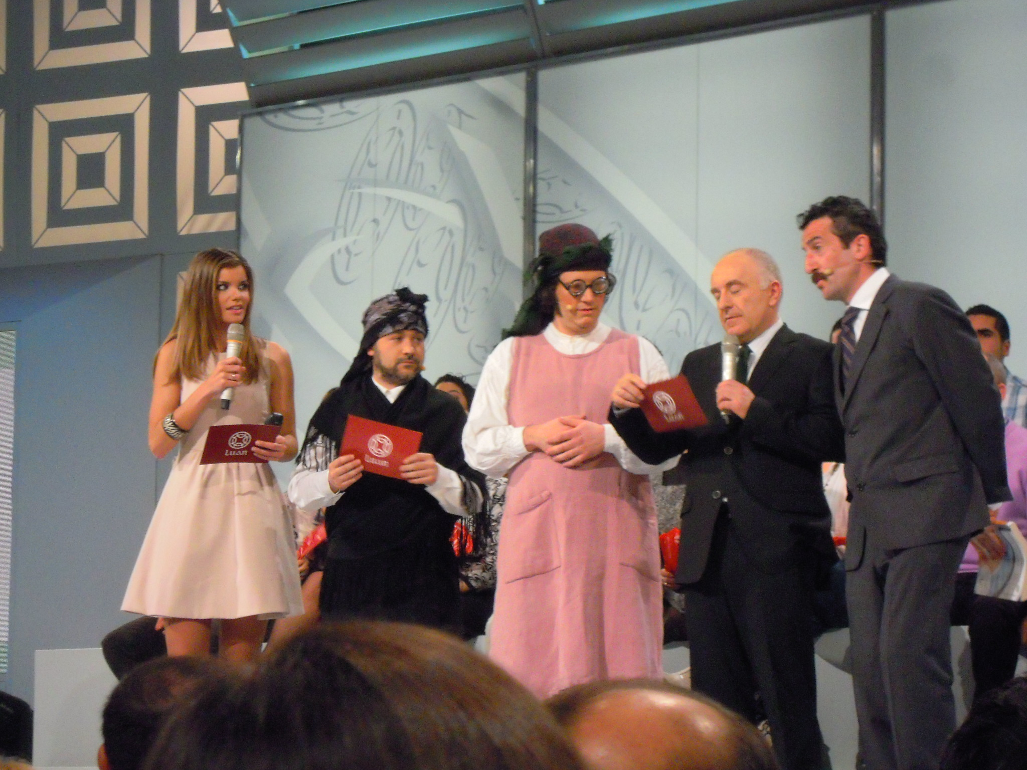 Laura Casares, Mucha e Nucha, Xosé Ramón Gayoso e Luis Zahera na gravación da 801ª emisión de Luar.